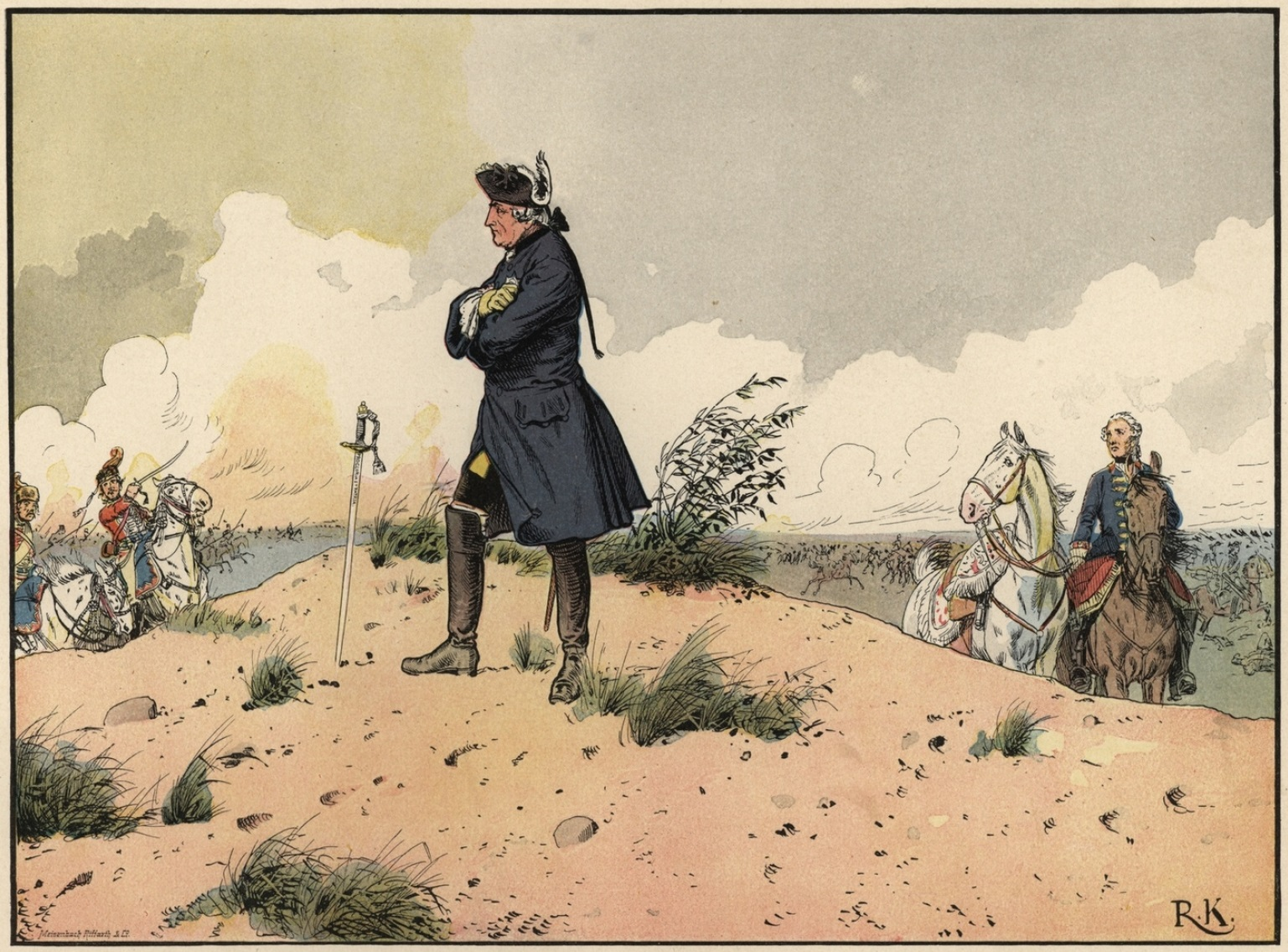 Illustration aus: Der alte Fritz in fünfzig Bildern für Jung und Alt (Paul Kittel, ca. 1910)